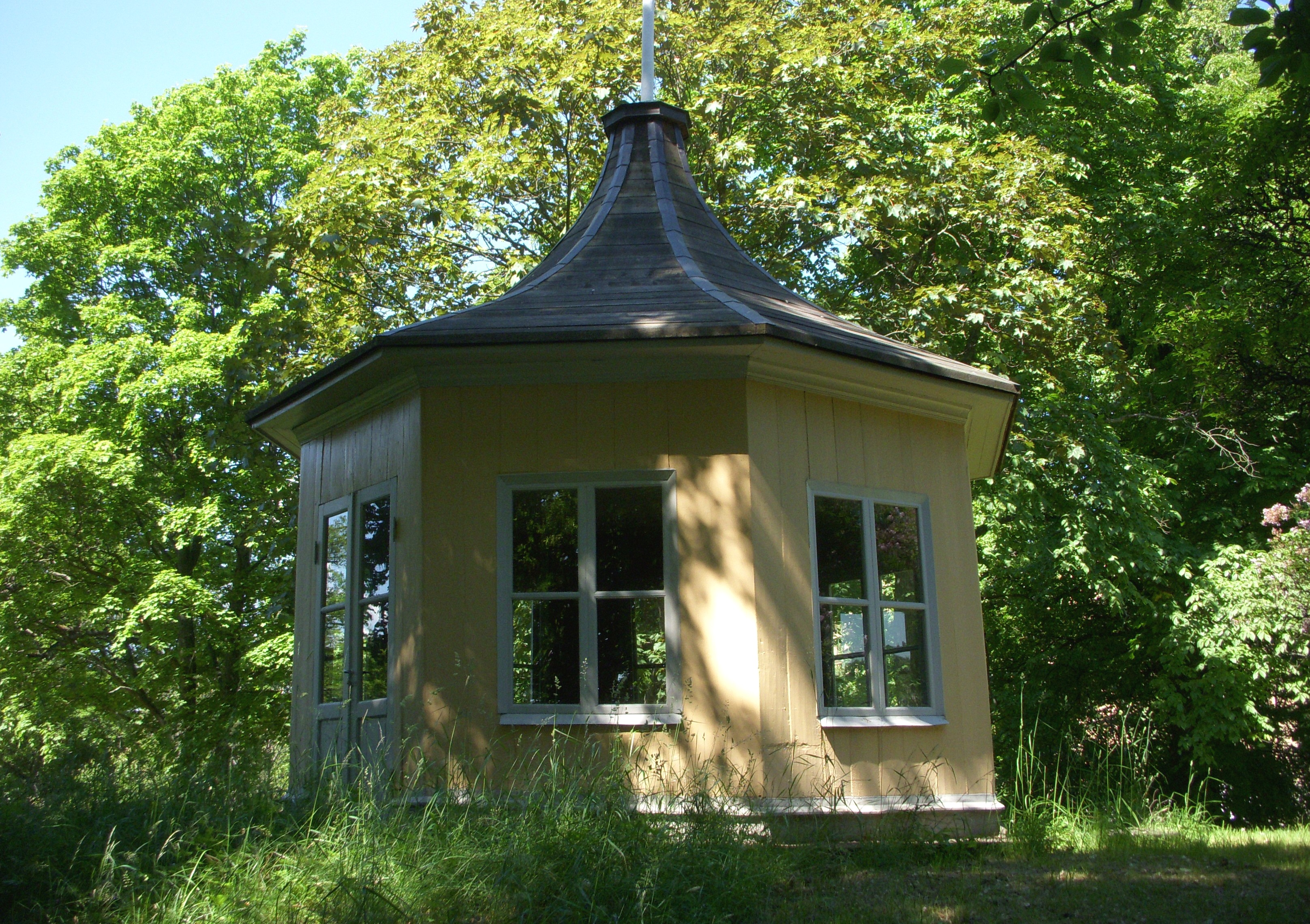 Lusthuset från 1700-talet på Nedere Manilla